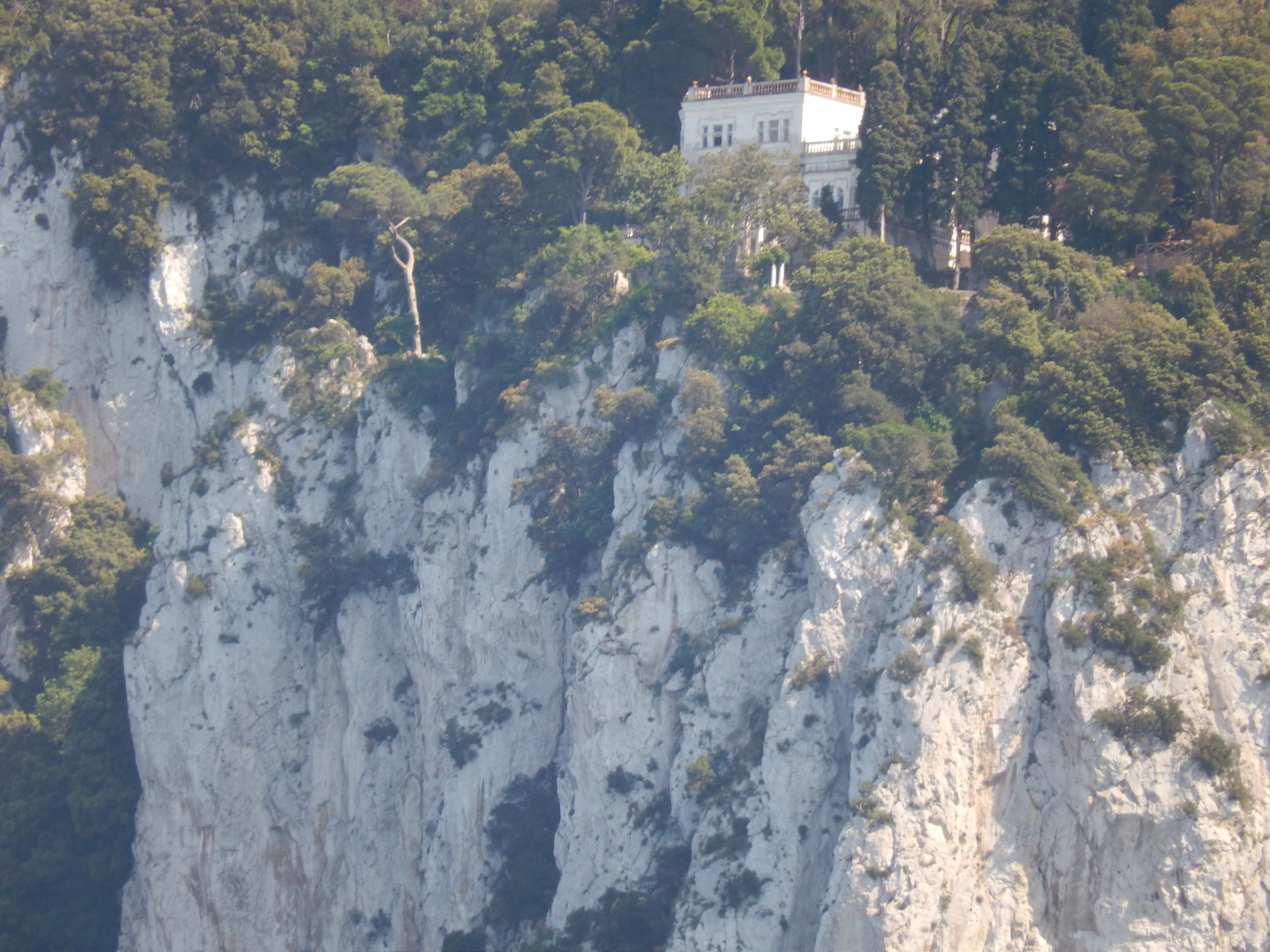 Villa Lysis von See